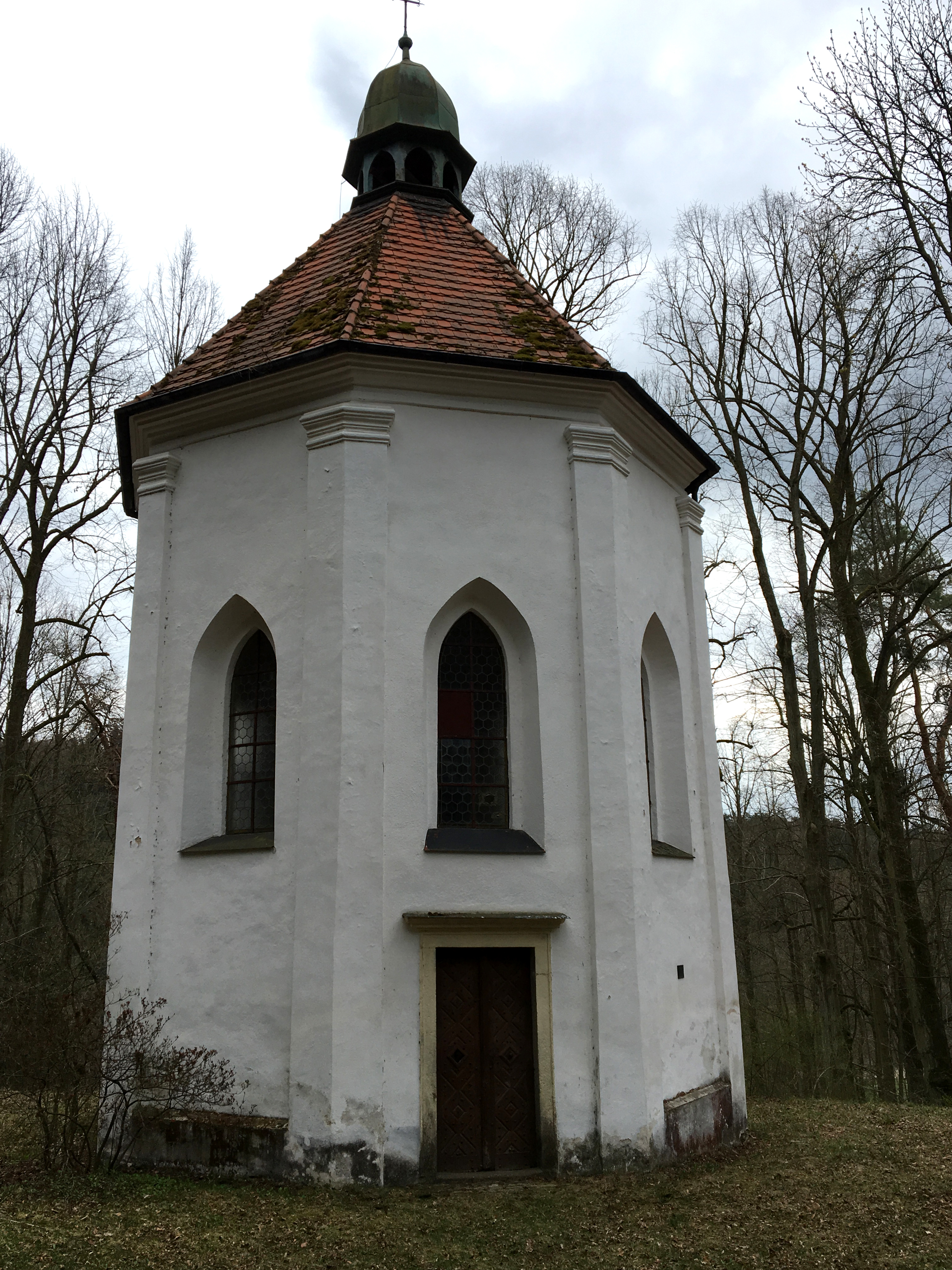 Kaple sv. Vojtěcha, Vrčeň